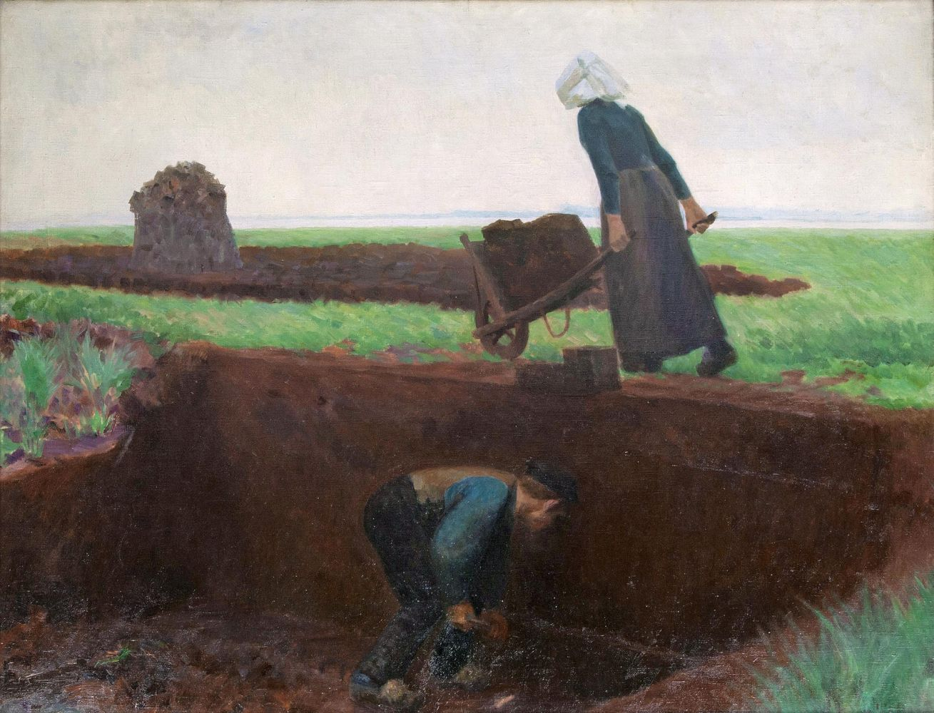 Auf dem Keilrahmen Etikett der Großen Berliner Kunstausstellung 1908. - Dargestellt ist das Ahlenmoor bei Flögeln im Kreis Bederkesa bei Bremerhaven. Ausstellungen: Das Gemälde war ausgestellt: Julius von Ehren. Ein Hamburger Maler der Lichtwark-Zeit. Altonaer Museum Hamburg 2004, Kat.-Nr. 29; Große Berliner Kunstausstellung 1908, Kat.-Nr. 1535.